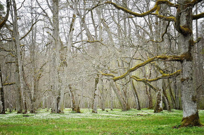 Suuremõisa mõisa park